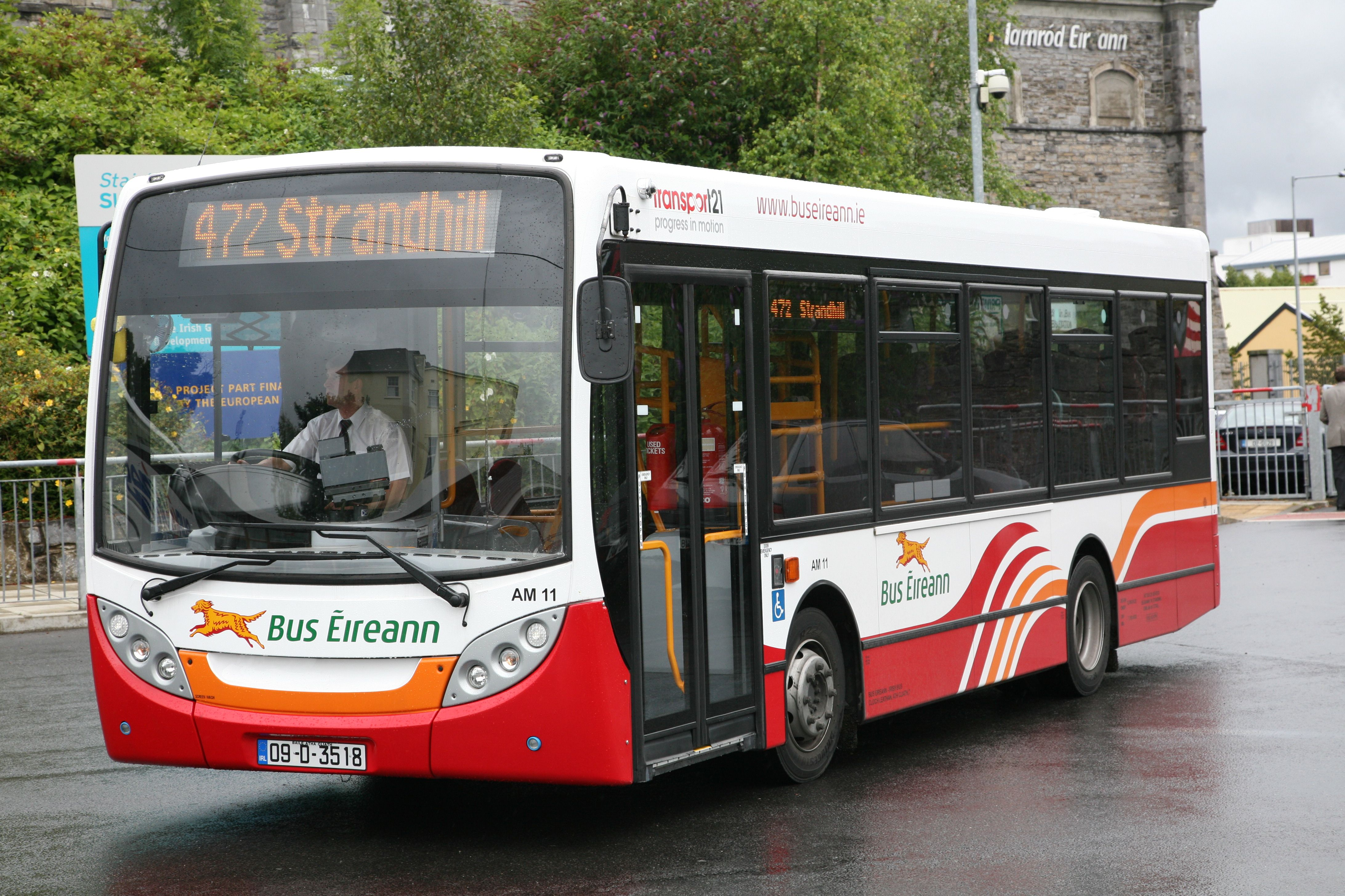 AM11 Sligo